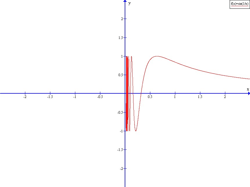 Gráfico de sin(1/x)